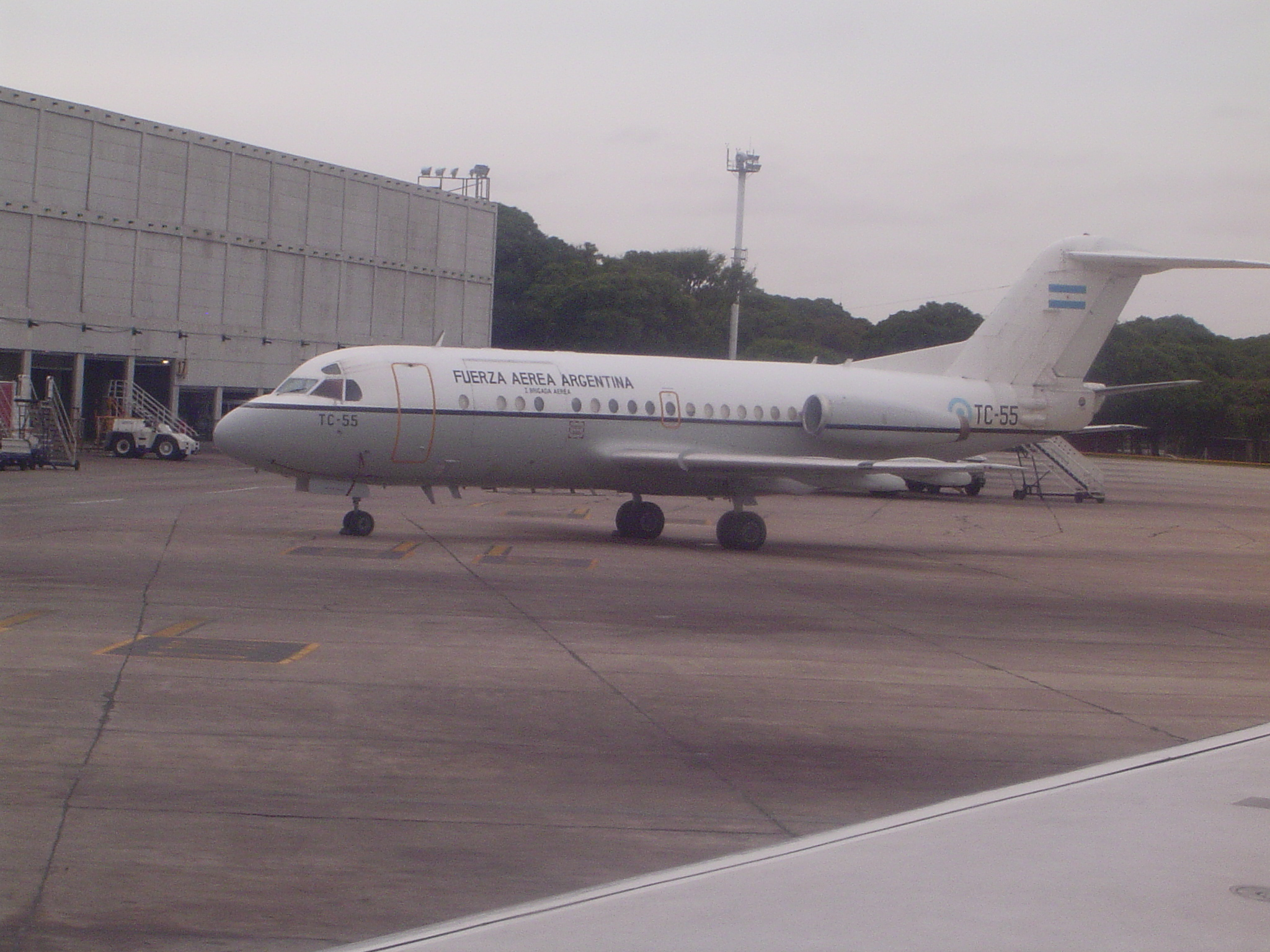 Avión Fokker F-28 de Lineas Aereas del Estado. Estacionado en Aeroparque Jorge Newbery.